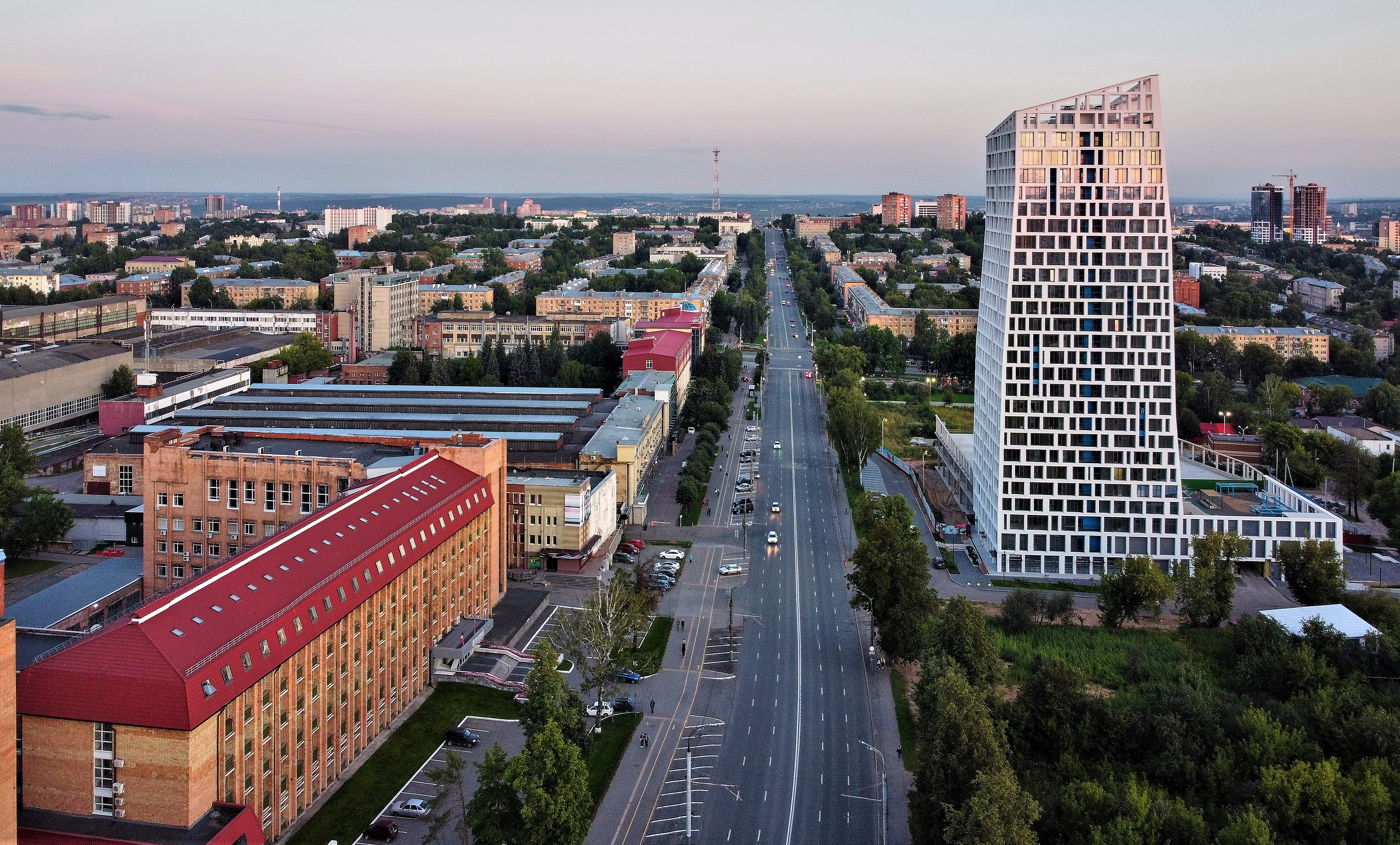 Вид на ул. Пушкинскую в Ижевске